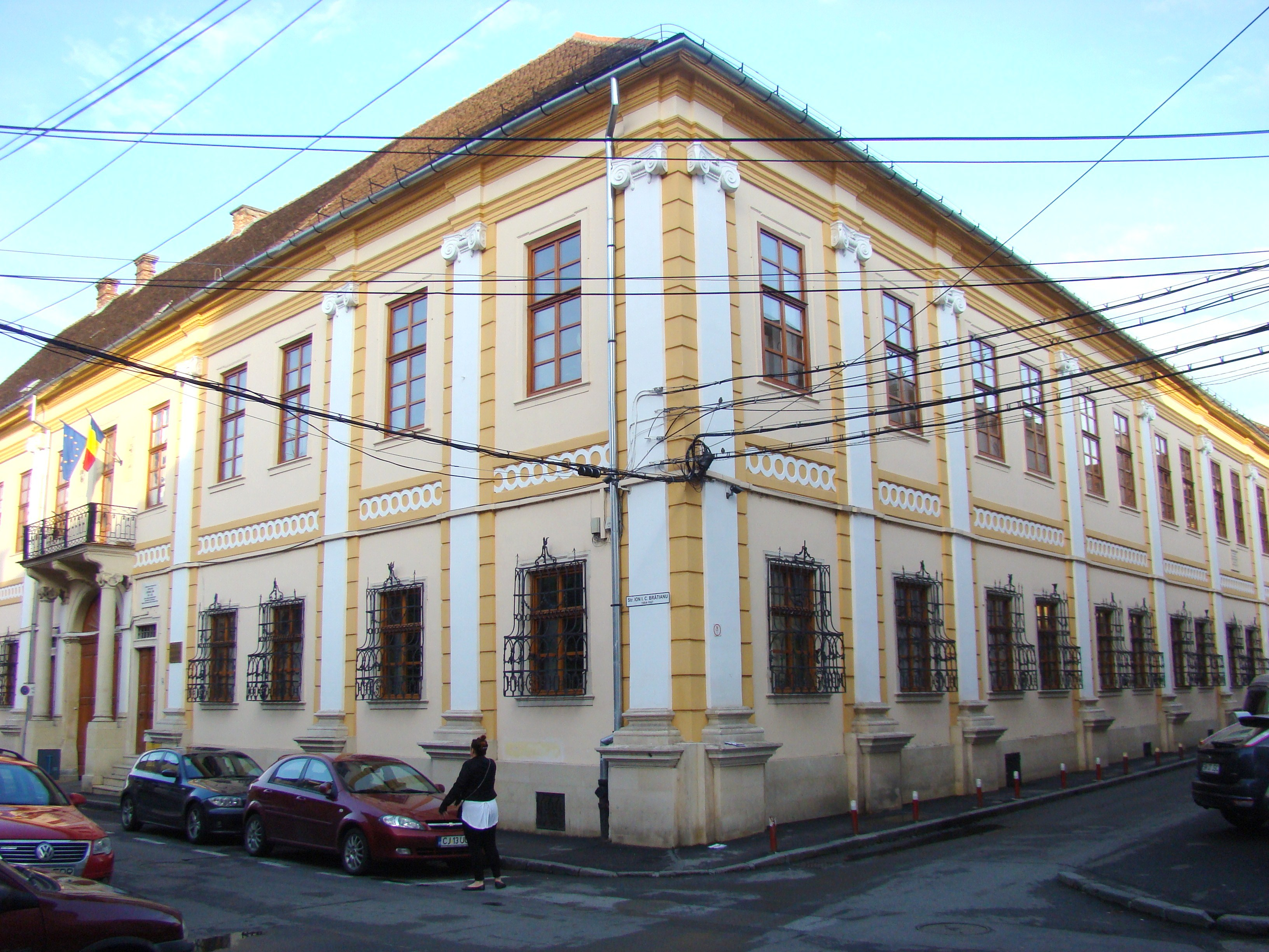 Palatul Tholdalagy-Korda din Cluj-Napoca, str.Brătianu, nr.14